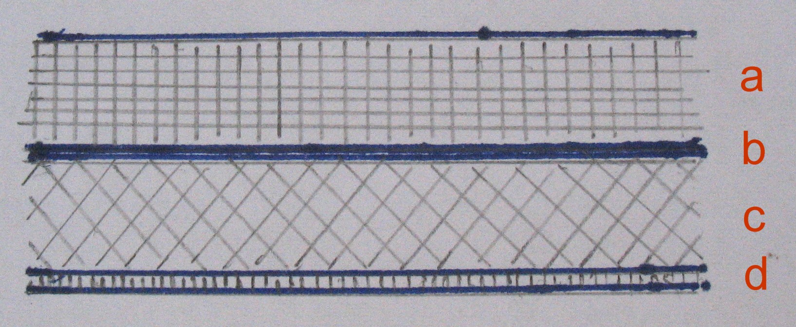 Struktura vicevrstve textilie s obsahem basofilovych vlaken